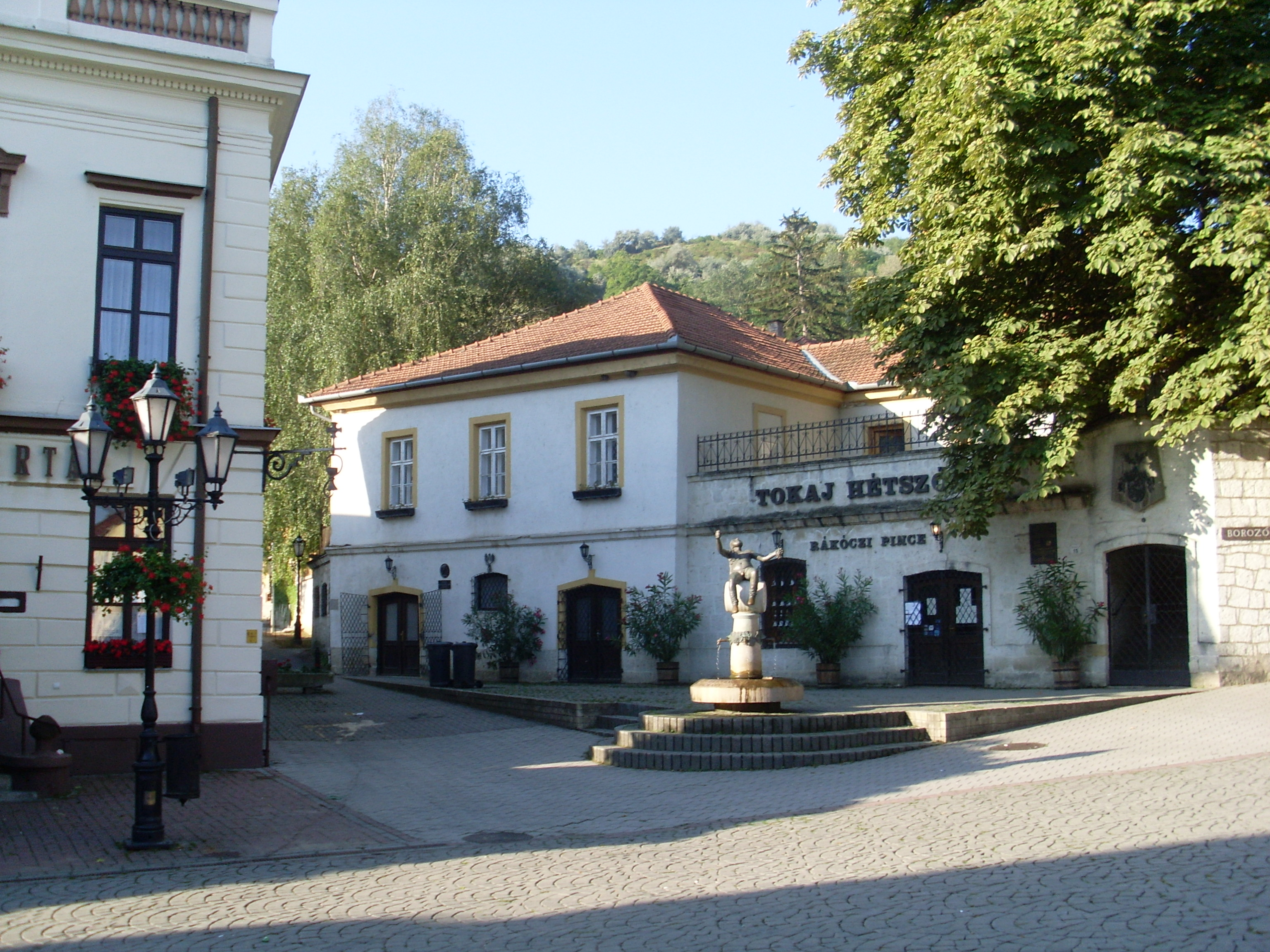 Place dans le centre ville de Tokaj (Hongrie)